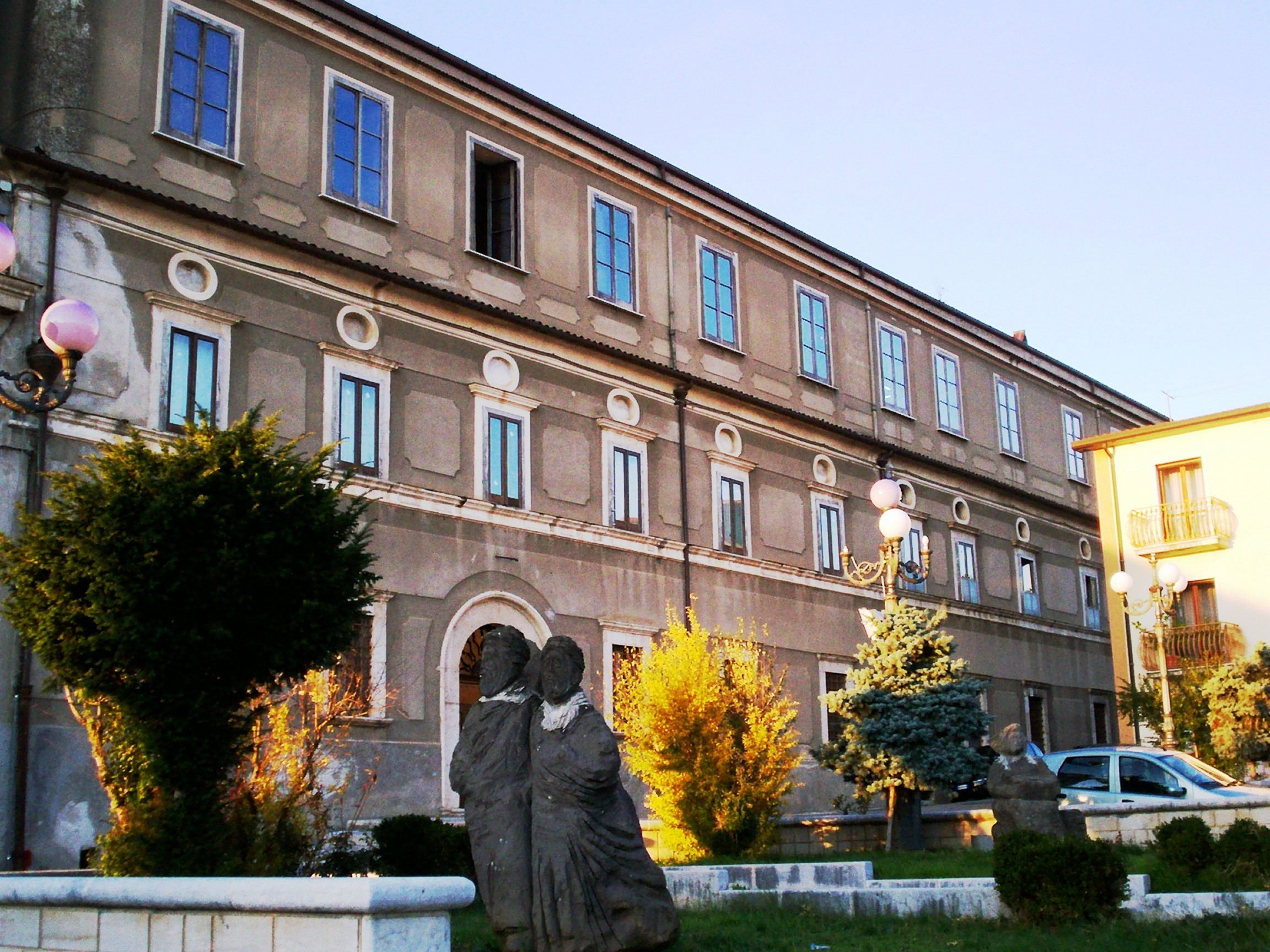 Esterno del Seminario Diocesano di Cerreto Sannita (Bn) preso da Piazza Giovanni Paolo II